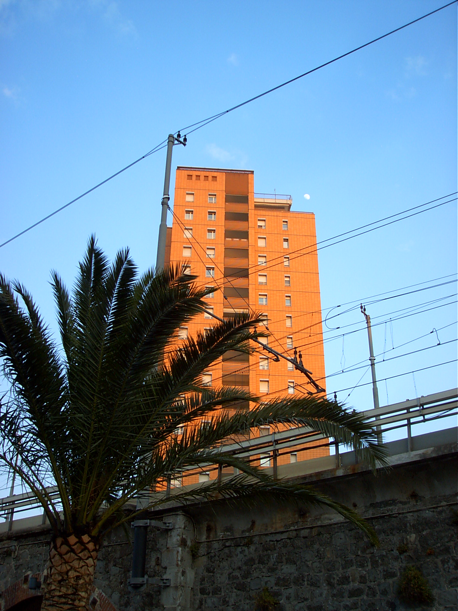 La Torre Sole nel complesso della Fiumara a Genova, dietro al viadotto delle ferrovie